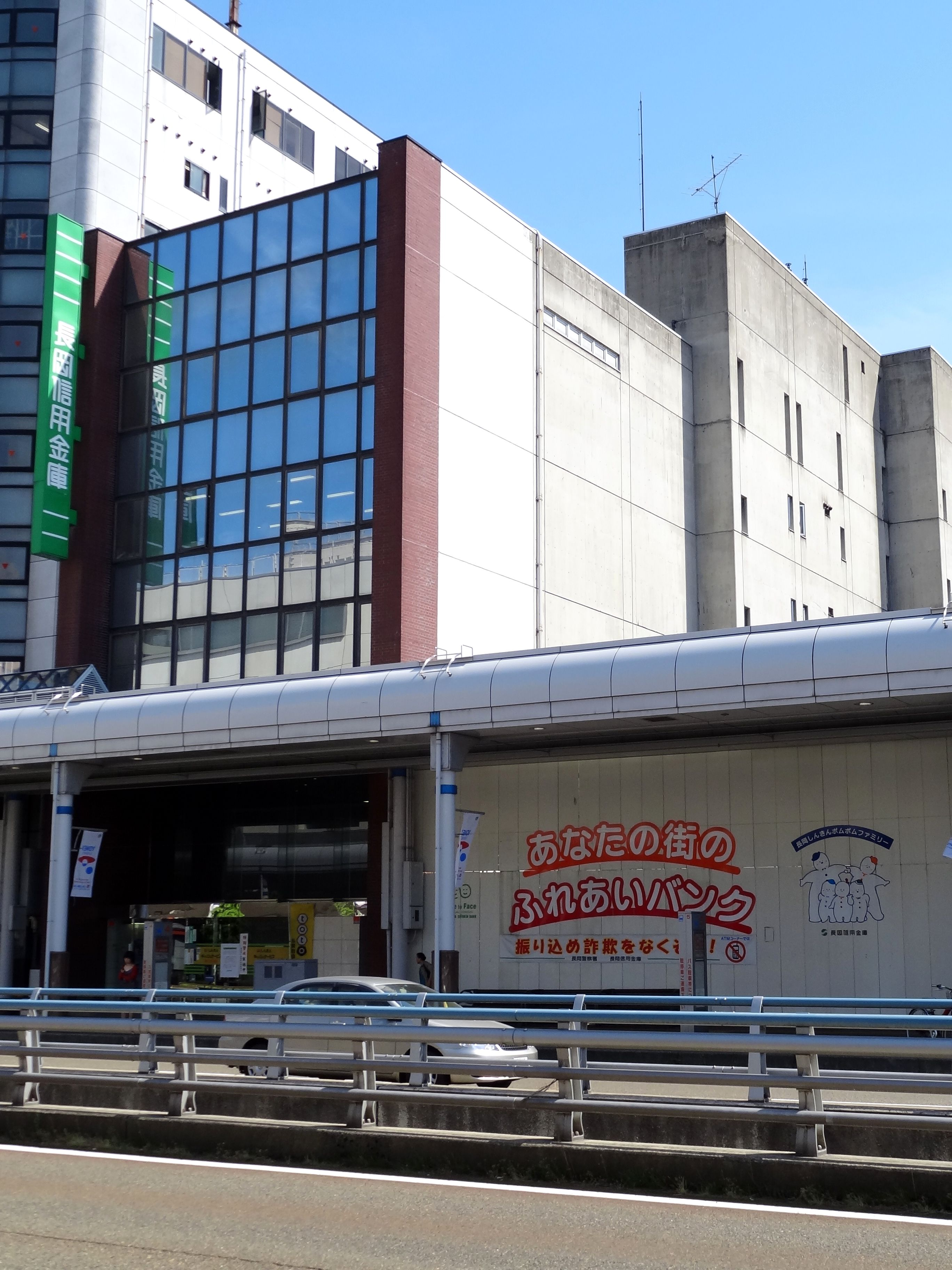 長岡信用金庫本店